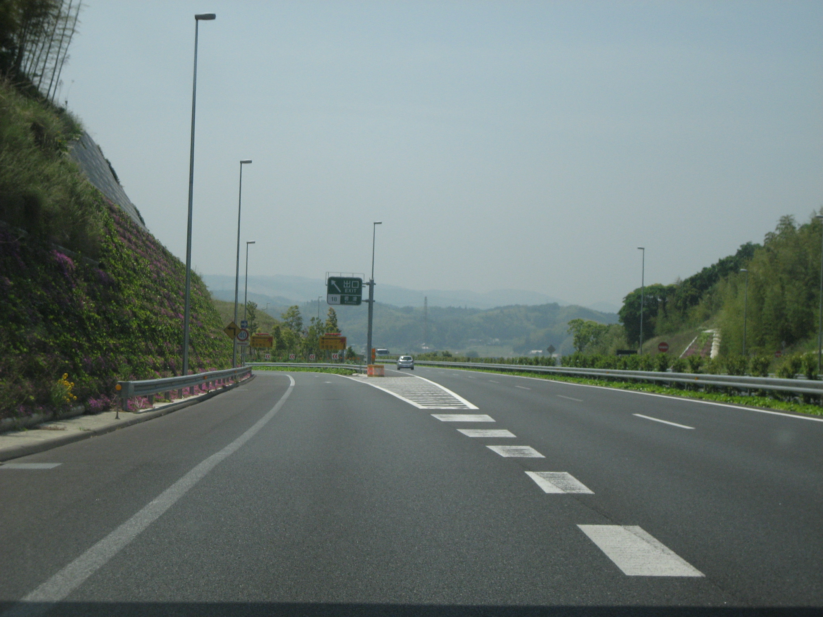 館山自動車道君津IC館山方面出口付近